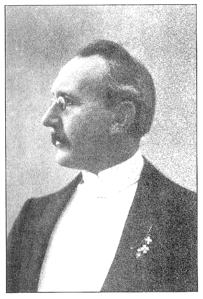 Ministerpräsident Viktor Alexander von Otto